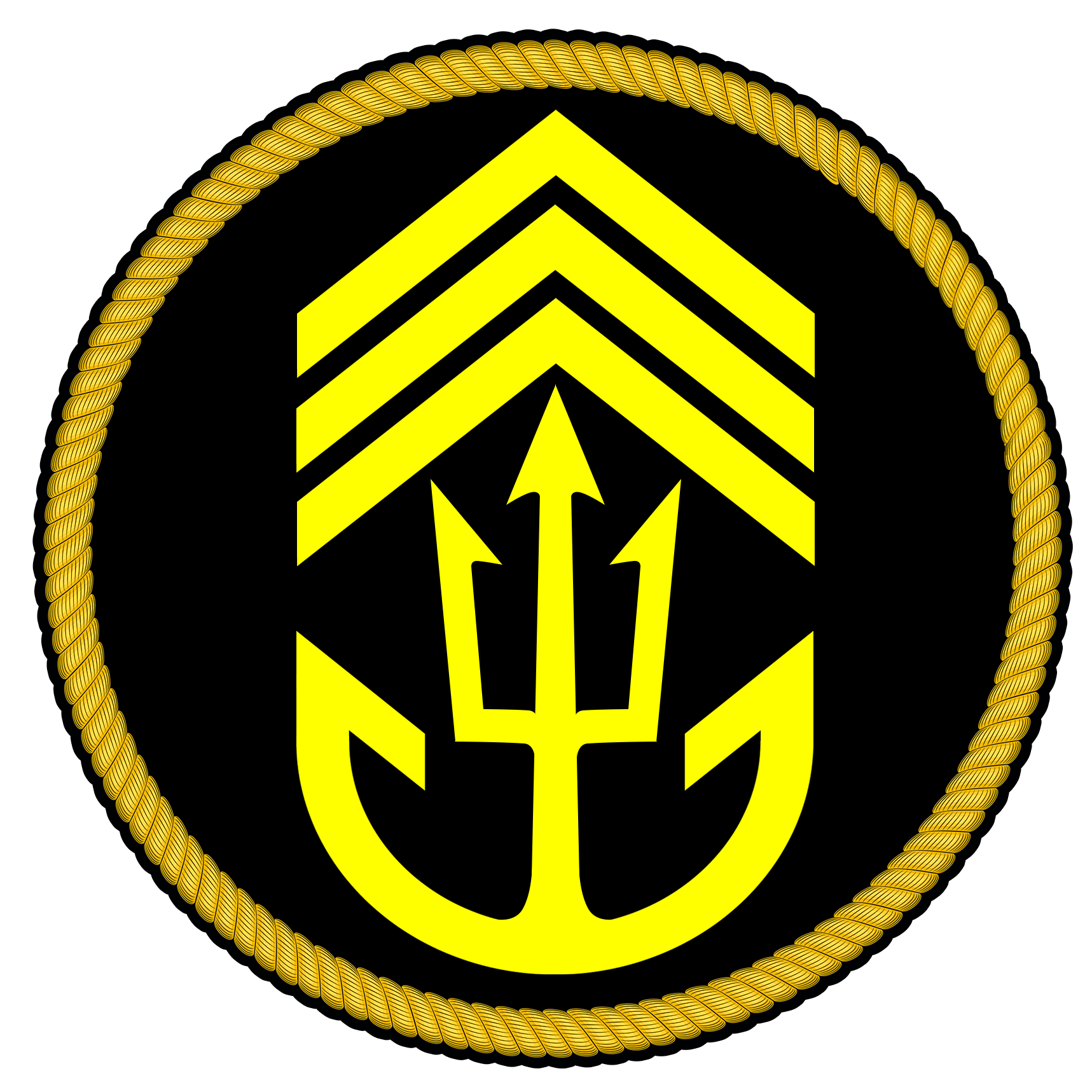 Даний нарукавний знак був створений ініціативною групою офіцерів та курсантів навчального закладу.